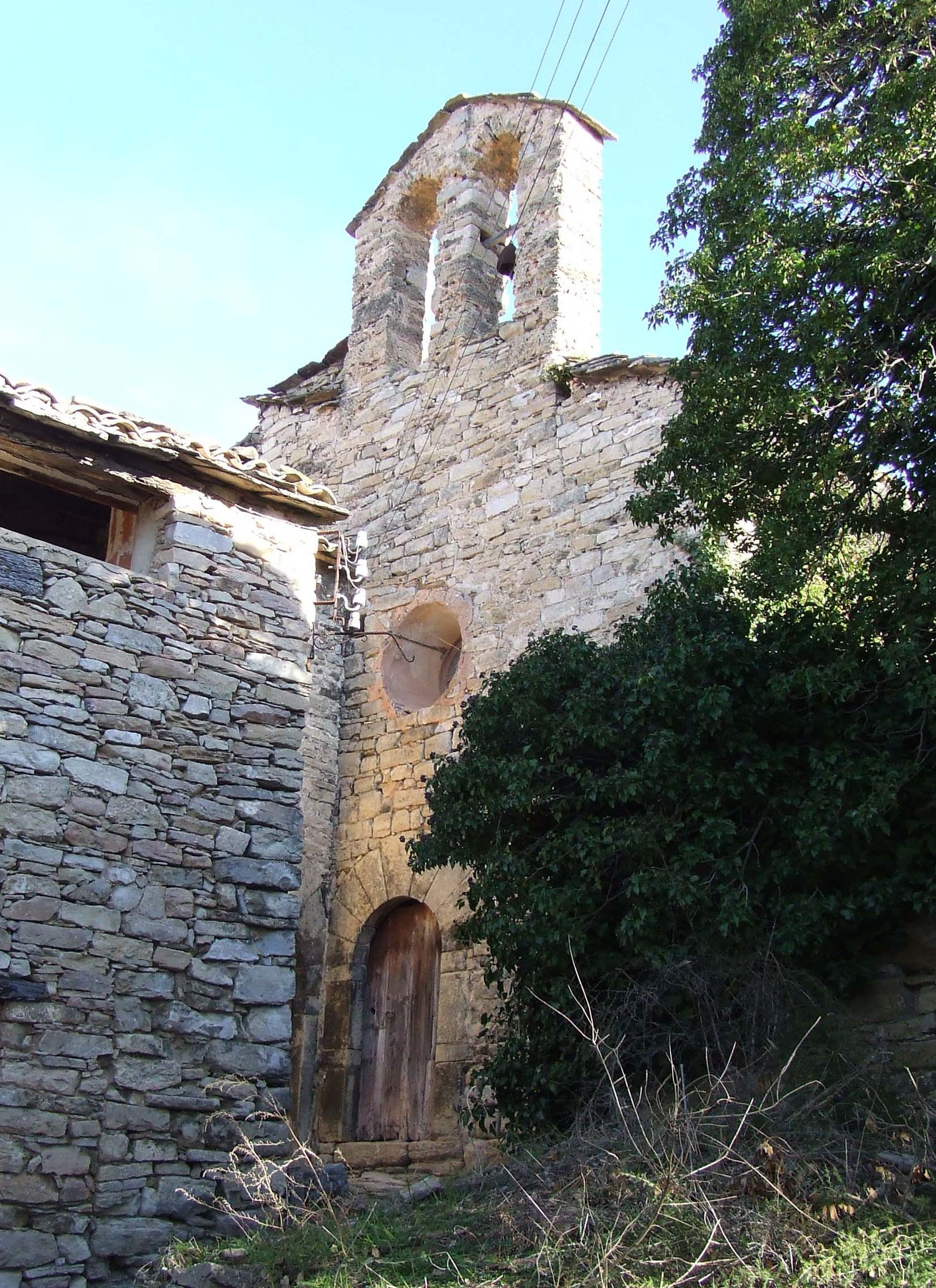 Santa Maria de Llordà (Llordà, Isona i Conca Dellà, Pallars Jussà)